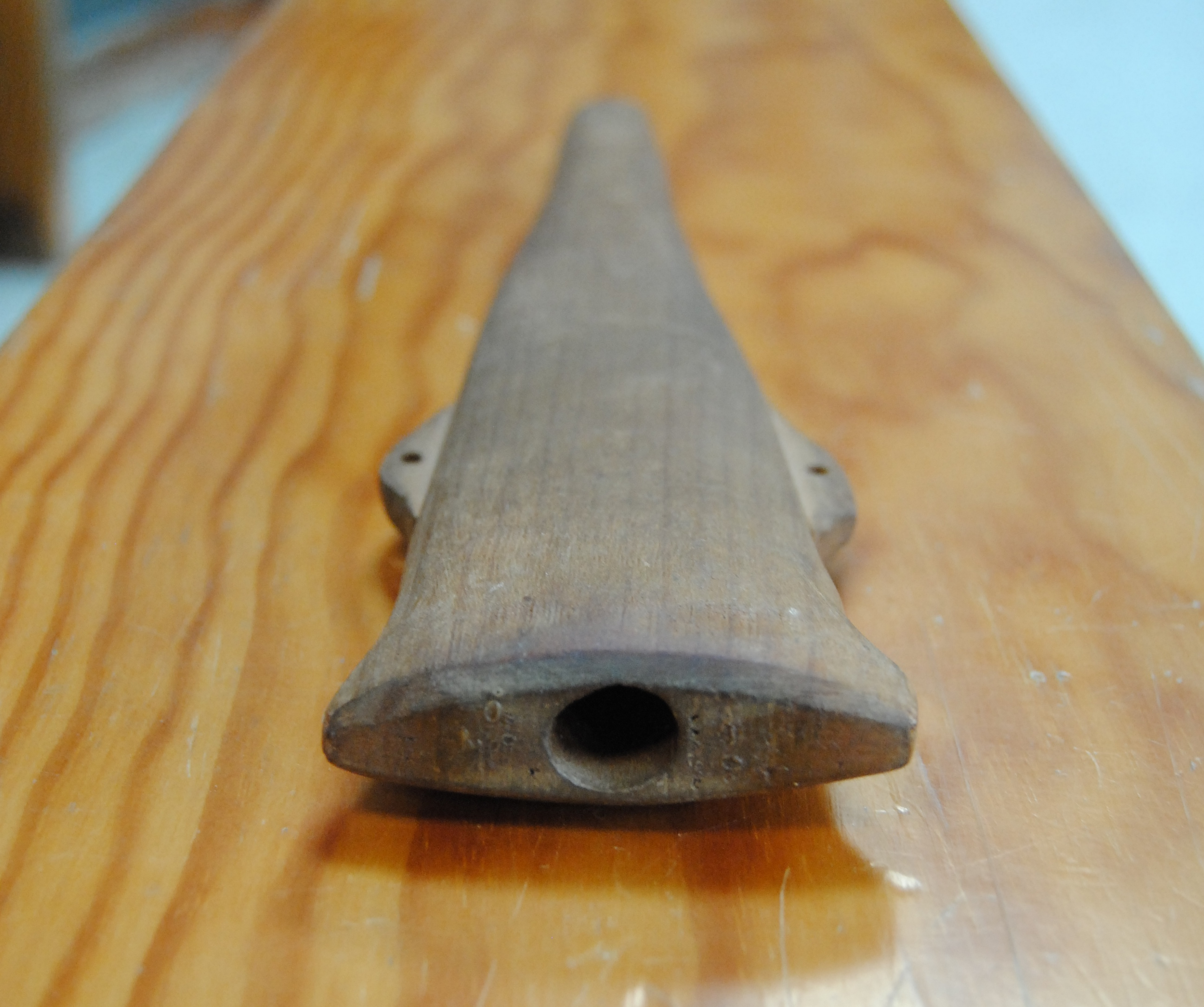 Pifilka o flauta de la patagonia de una sola nota, para hacer rítmicas